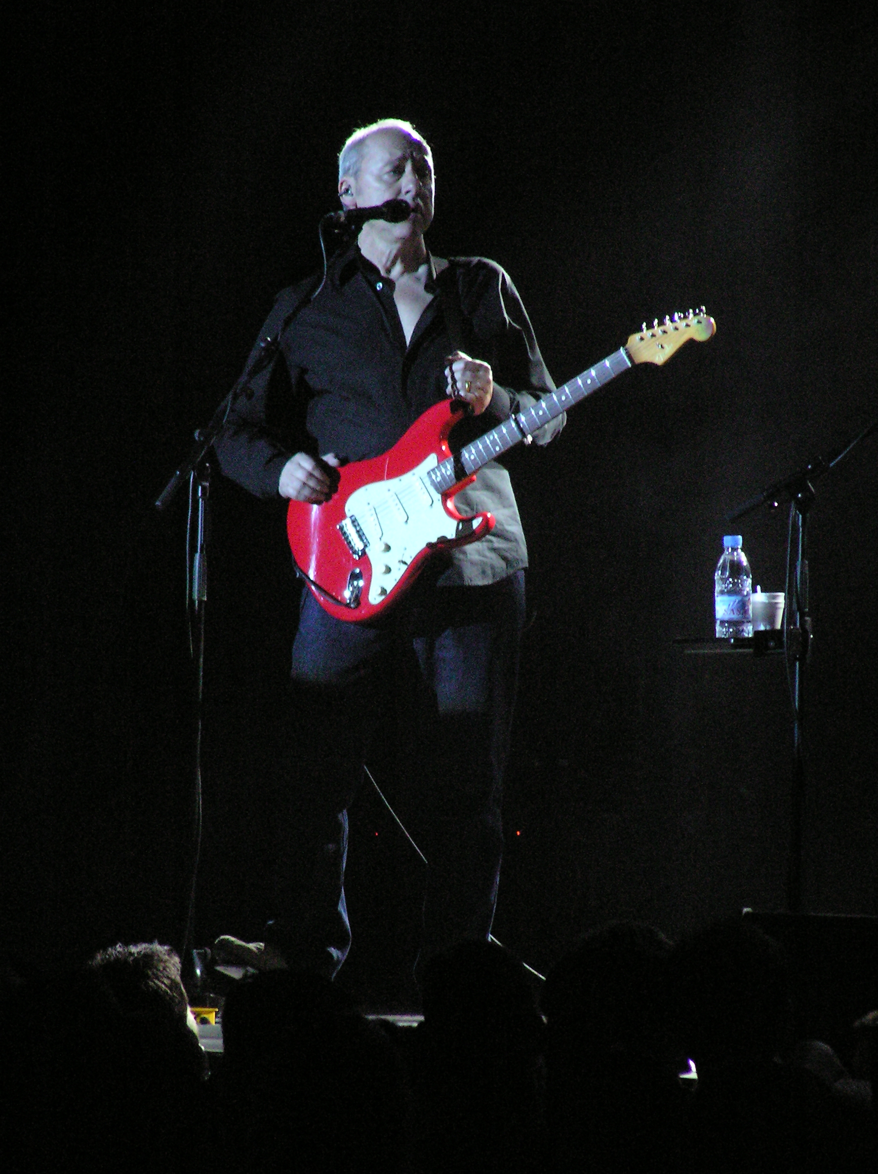 Mark Knopfler Konzert Hamburg 28.05.2006